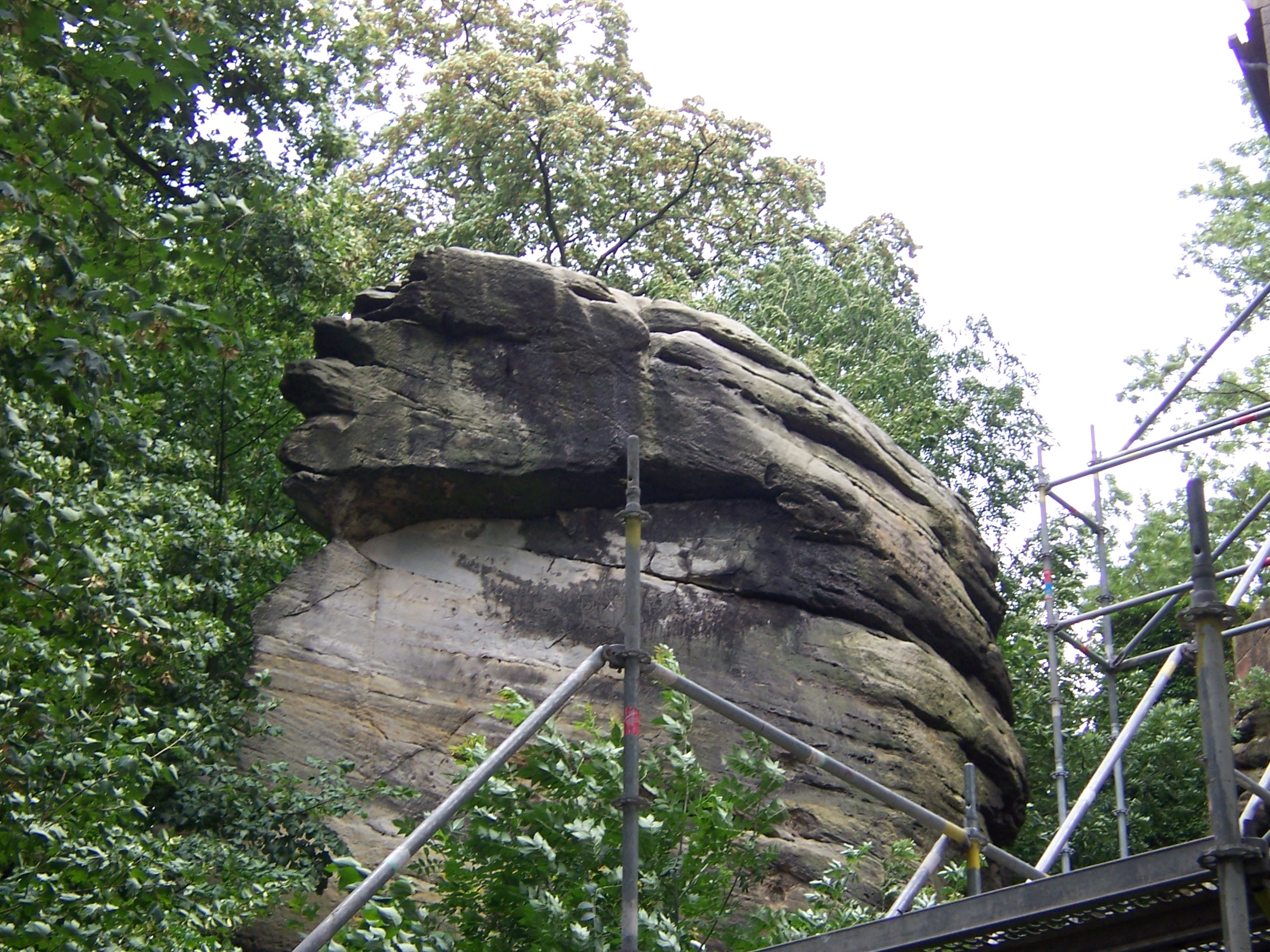 Felsformation "Teufelsohrkissen" in Bad Bentheim